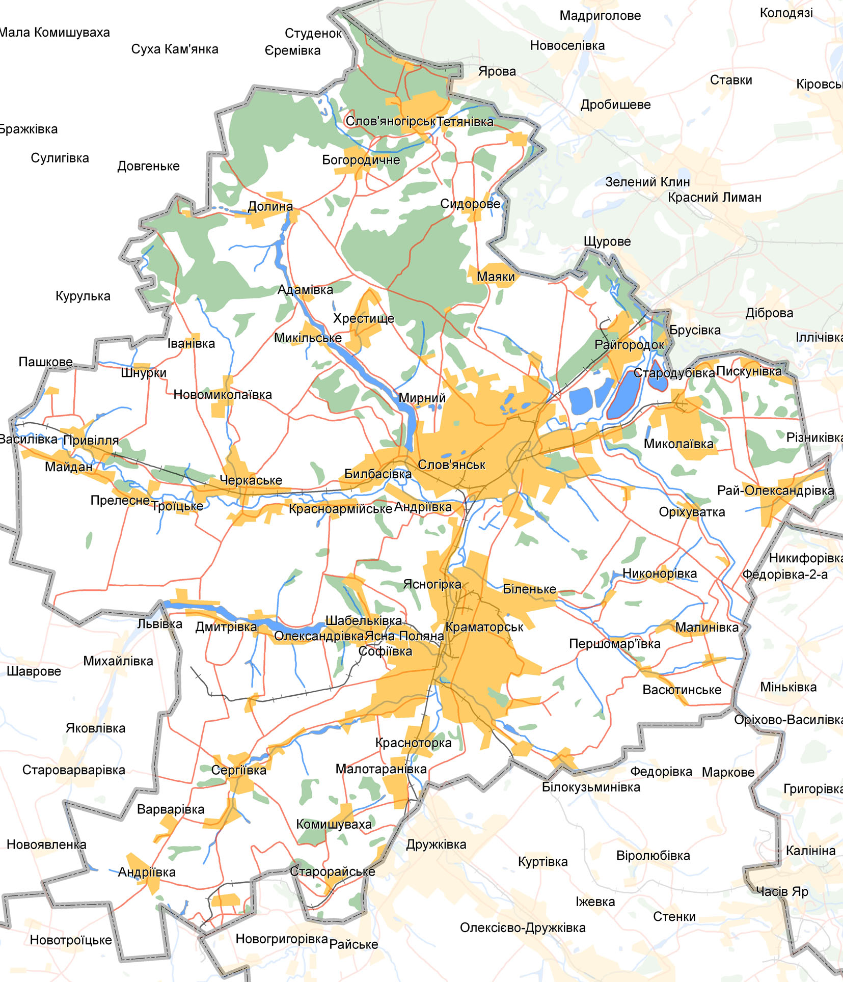 Map